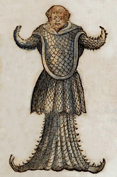 Buchseite aus Konrad Gesner: Fischbuch, Der zwölffte theil von de Meertheire. So begreifft allerley grosse Wallfisch, Meerwunder und Schiltkrotten, S. 105 v (Abb. Meermünch und Meerbischoff)